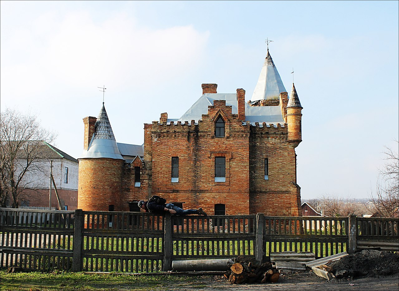 Планкинг